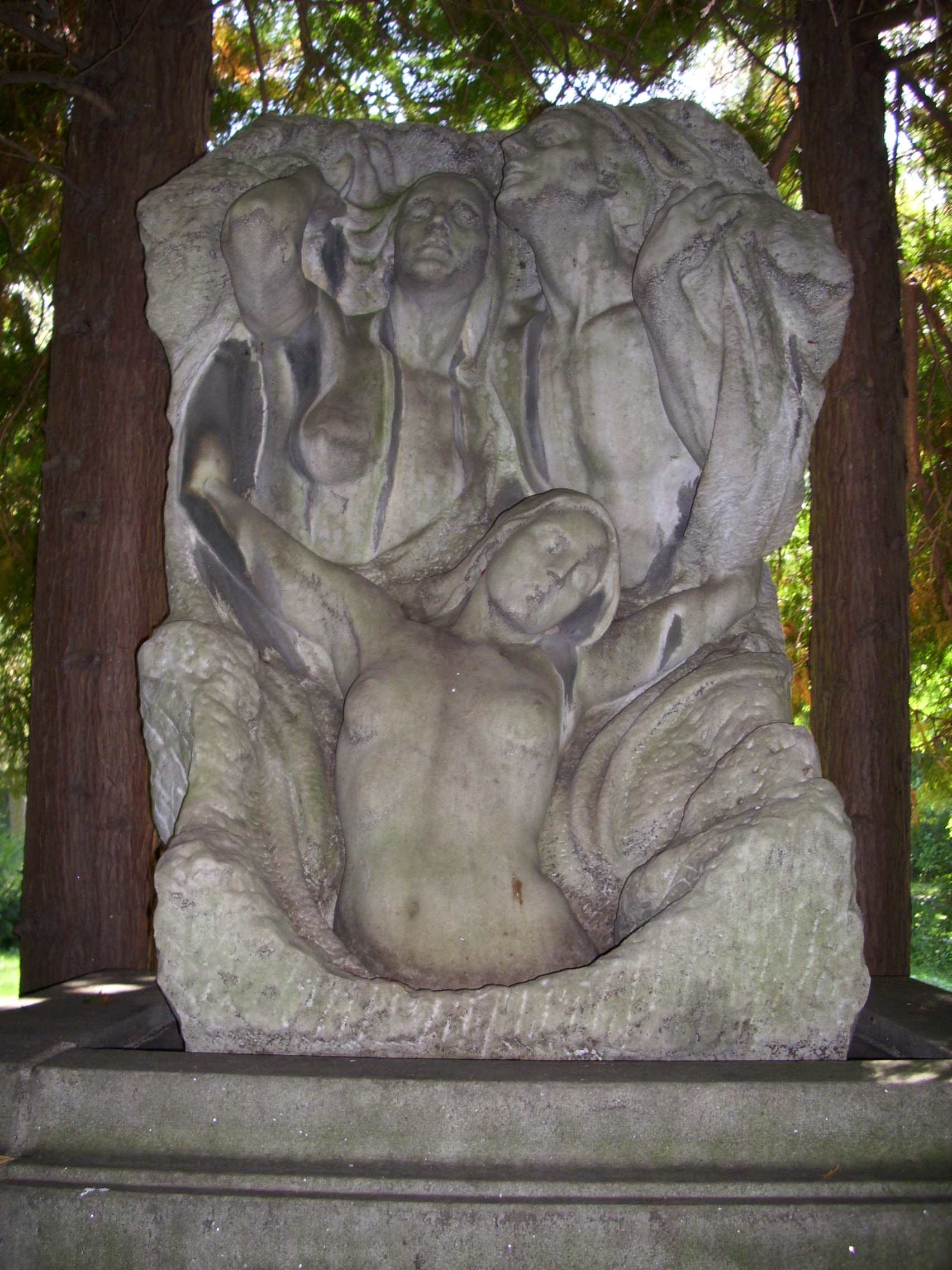 Albrecht Leistner: Skulptur Auferstehung, 1920, Marmor, Südfriedhof Leipzig